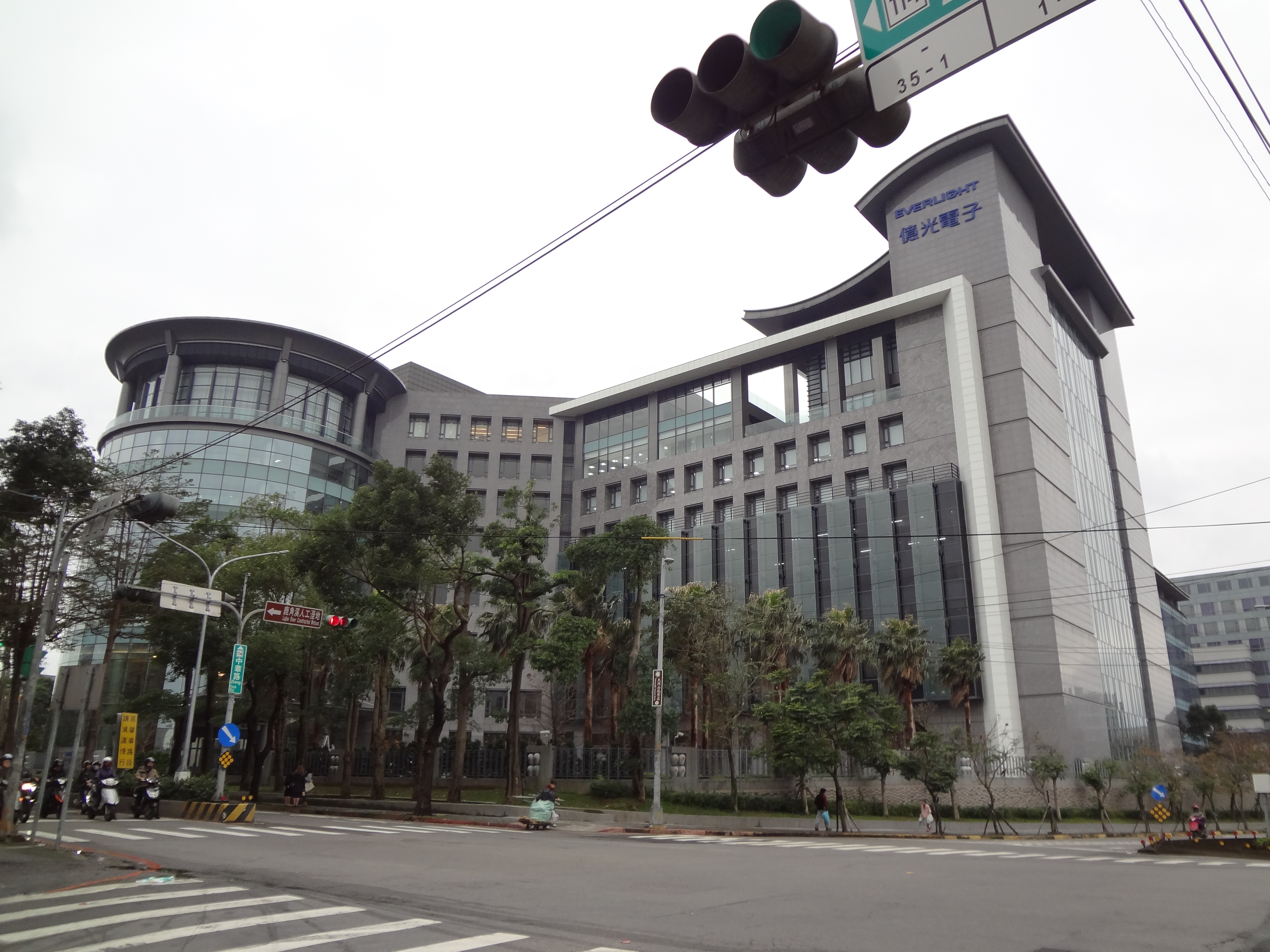 億光電子全球營運總部，位於新北市樹林區中華路6之8號，2011年落成啟用。